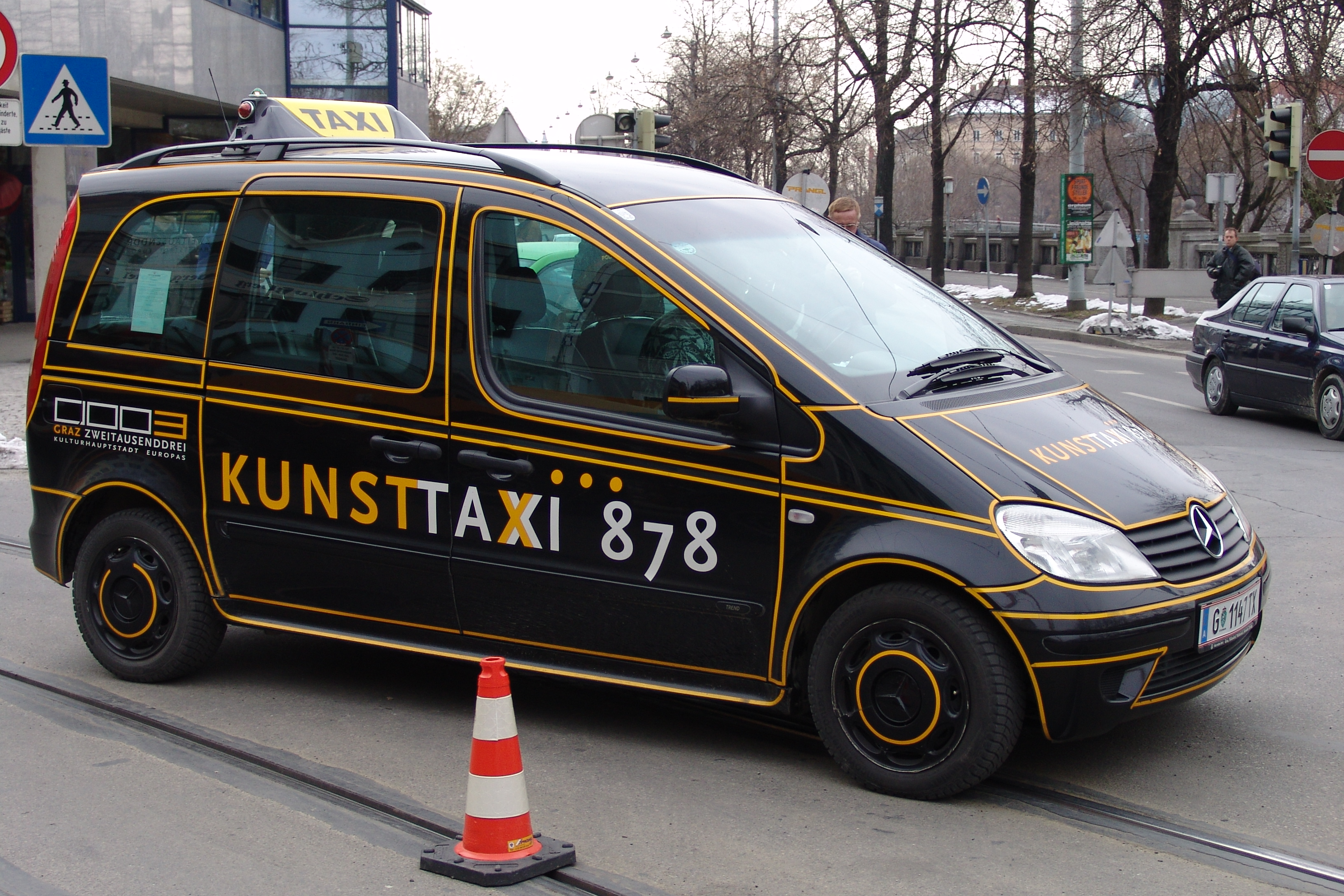 Mercedes-Benz W414 VaneoKunsttaxi in Graz, Austria.